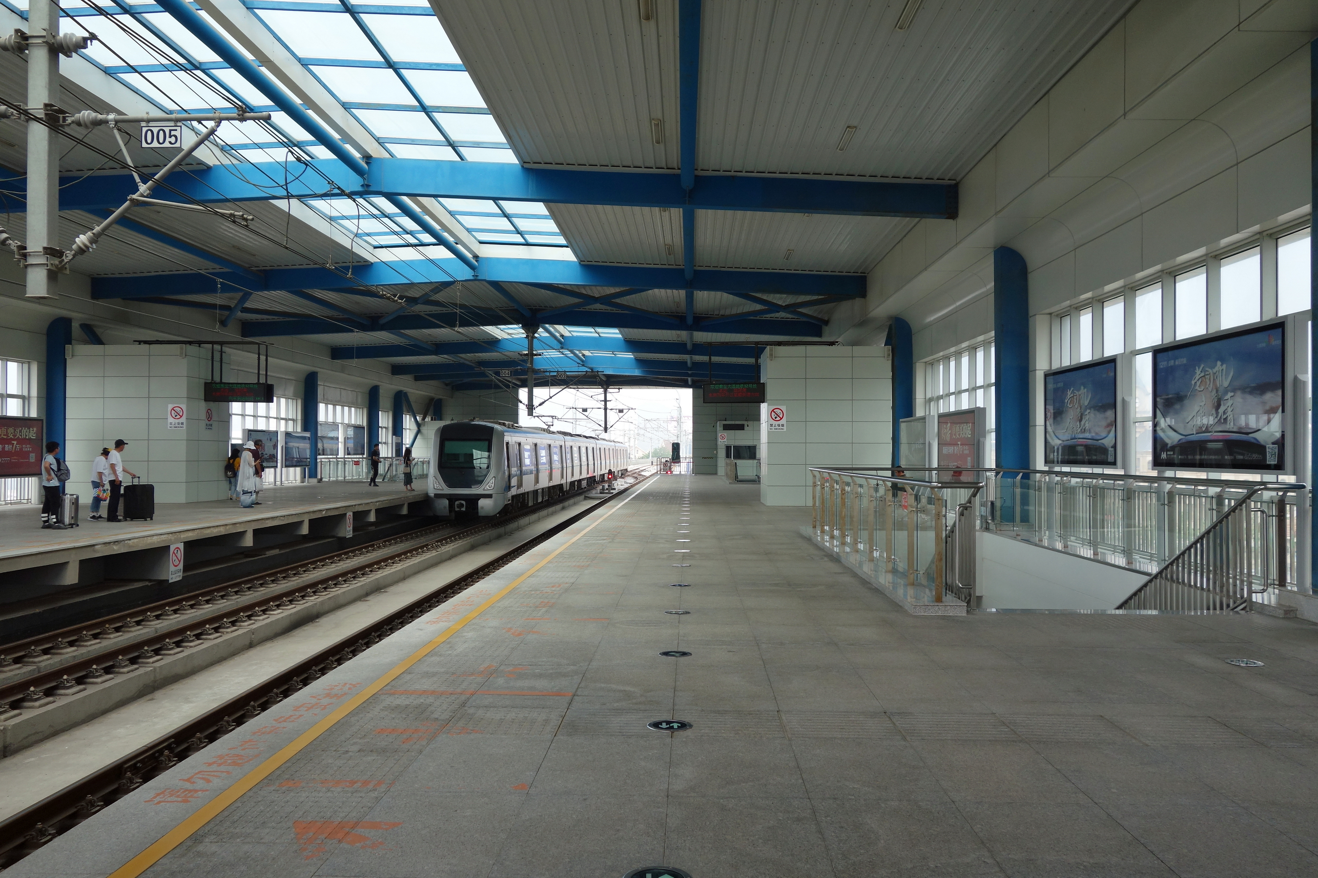 大连地铁12号线塔河湾站站台